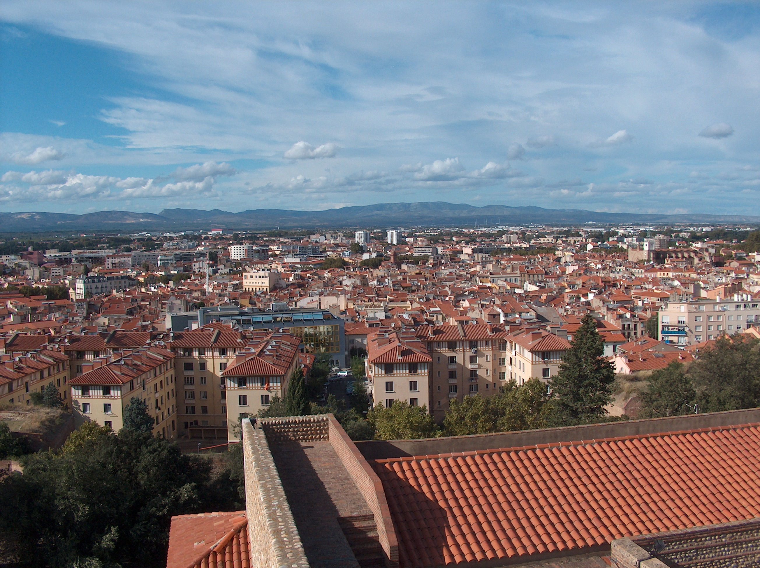 Vue panoramique de la ville de Perpignan et du centre ancien